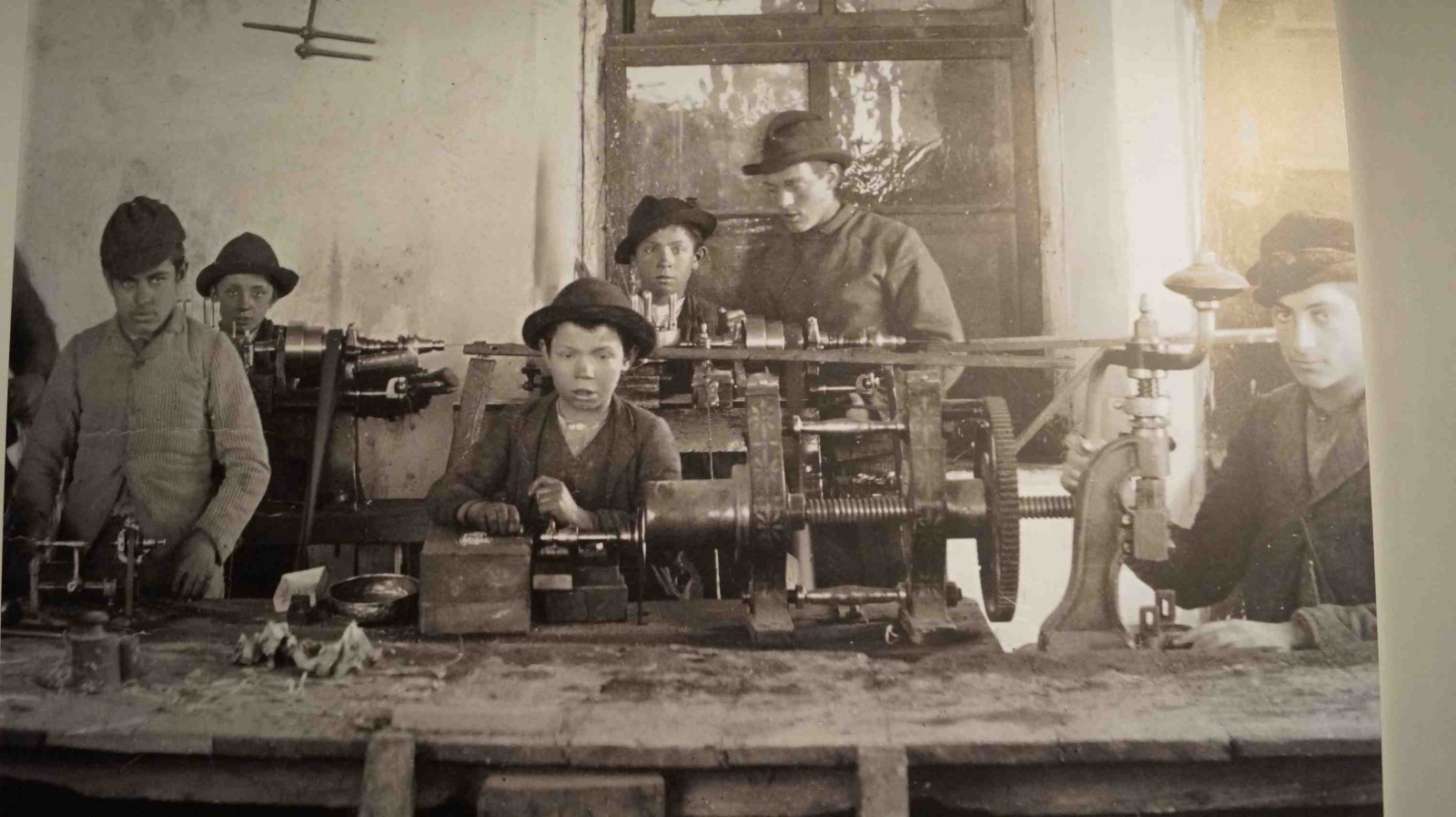 Laboratorio occhialeria Lozza.